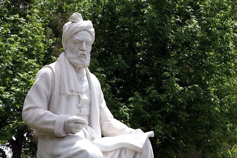 تندیس فردوسی در آرامگاه فردوسی در توس، ایران. سال نصب تندیس: ۱۳۴۸ شمسی. با فرض اینکه تندیس در مالکیت شخص حقوقی بوده، ۳۰ سال از رونمایی آن گذشته و در حال حاضر در مالکیت عمومی است. در نتیجه عکس گرفتن از آن فاقد اشکال است.